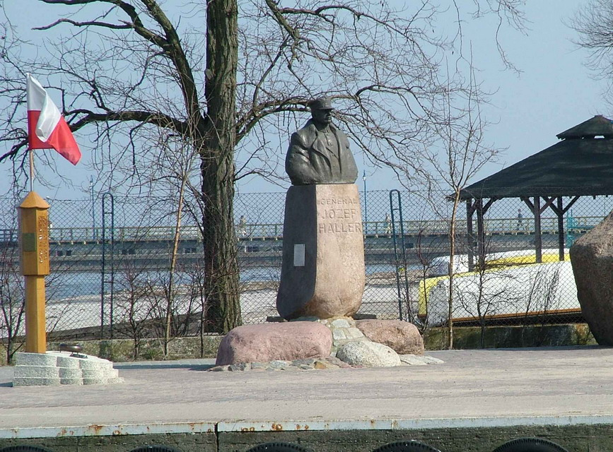 Puck - pomnik gen. Józefa Hallera.